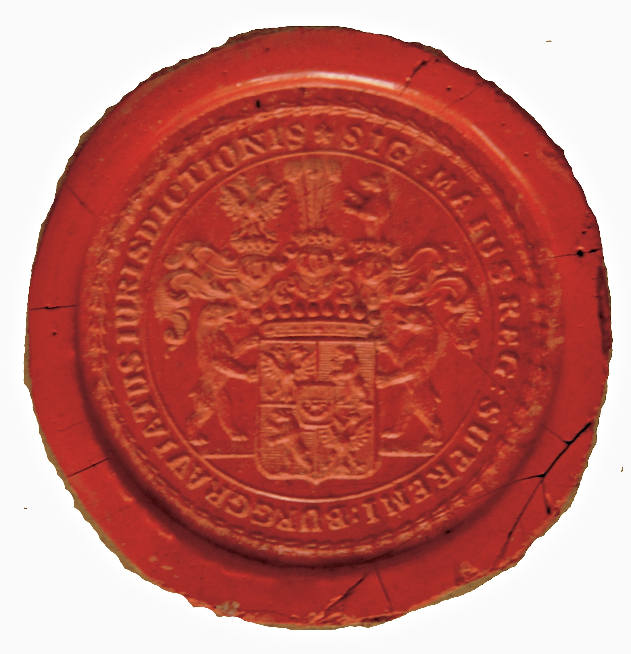 Pečeť nejvyššího purkrabího Království českého 1802